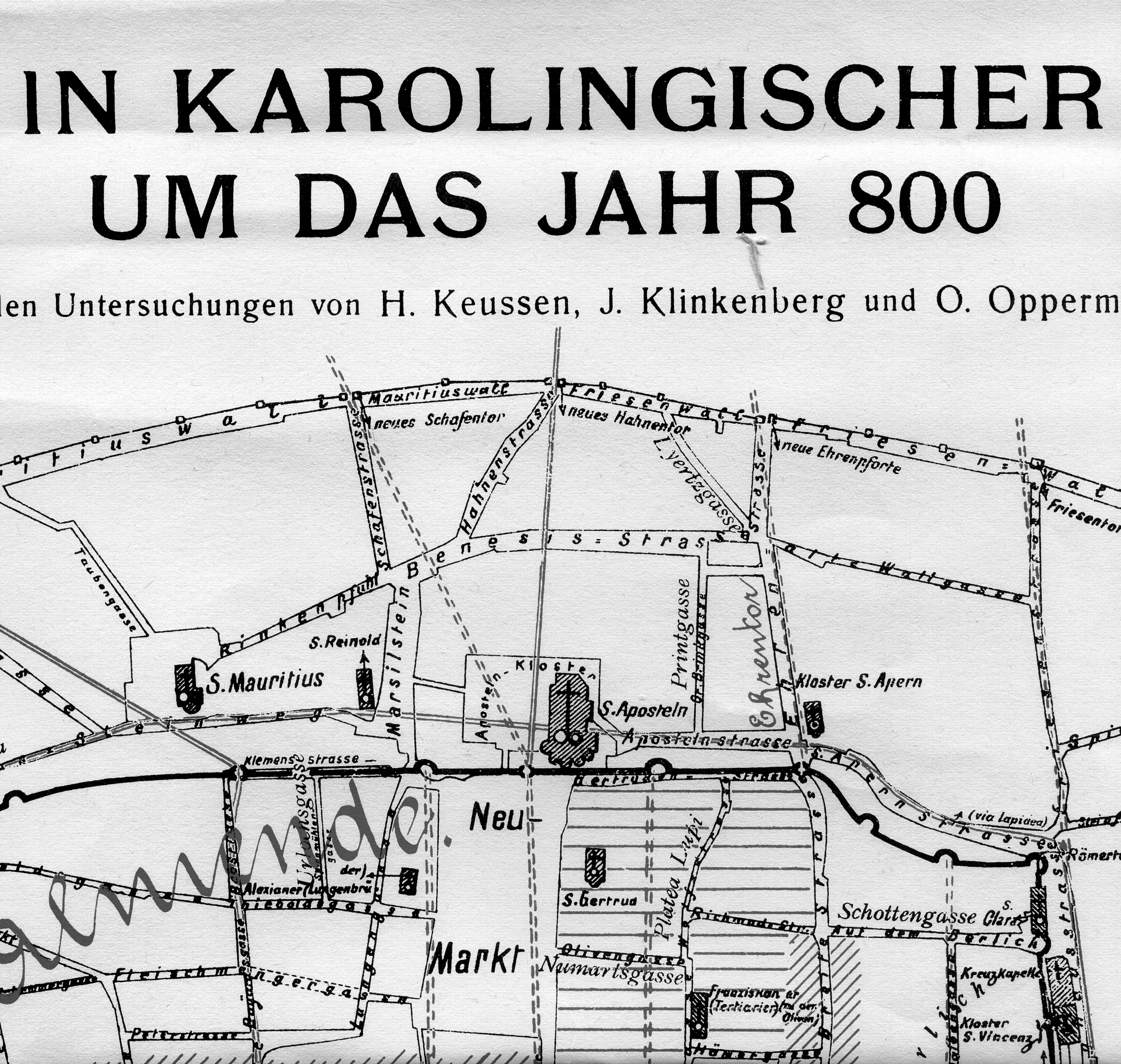 Köln, westliche Römermauer und Umfeld um 800. Ausschnitt einer Situationskarte in der Topographie der Stadt Köln, bezogen auf die Karolingerzeit